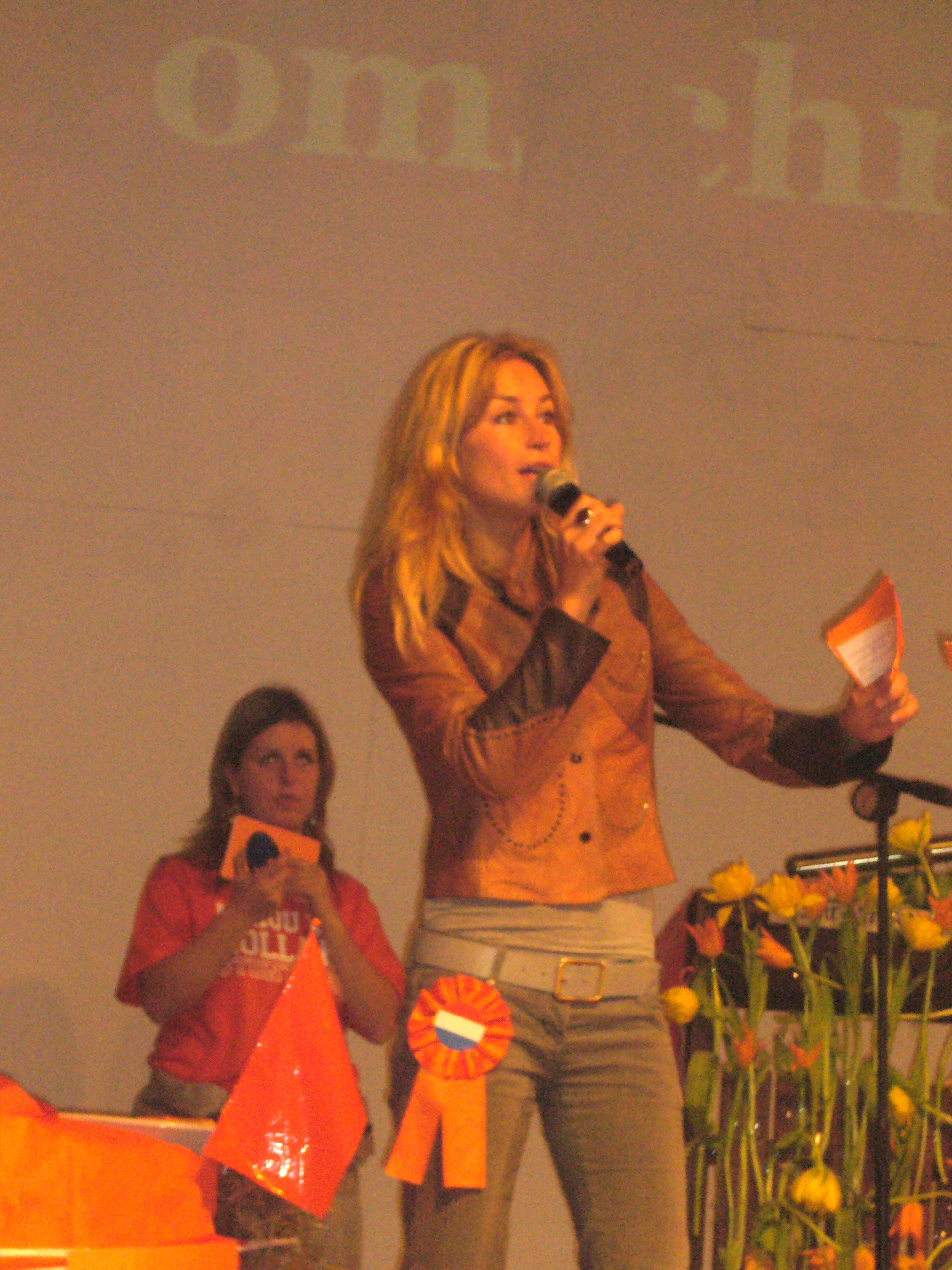 Wendy van Dijk als presentatrice van een schooloptreden.